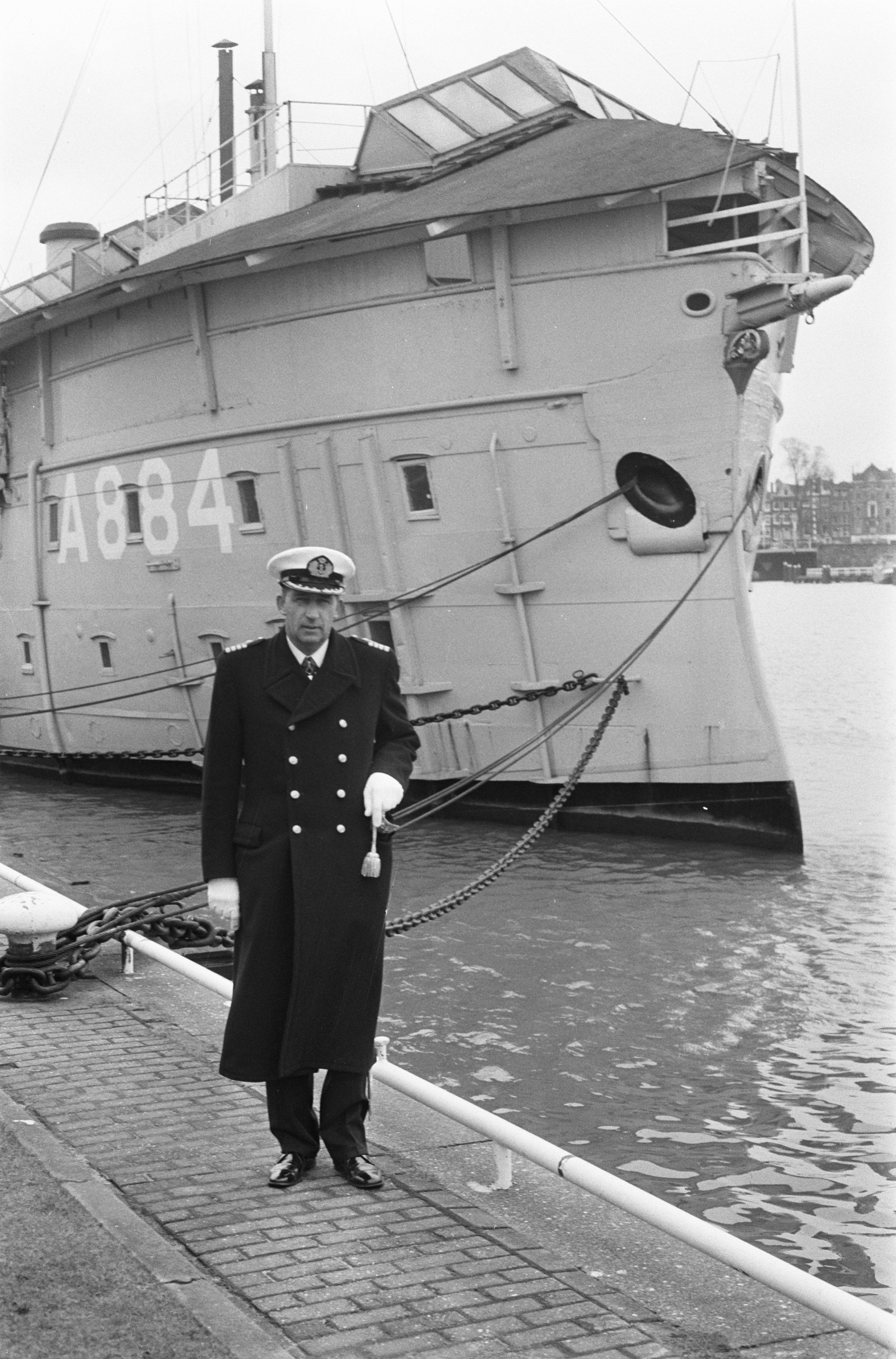 Collectie / Archief : Fotocollectie Anefo Reportage / Serie : Buitendienststelling van rampschip "Buffel" in Amsterdam Beschrijving : Kapitein ter zee P. W. Osieck voor de "Buffel" Datum : 18 januari 1974 Locatie : Amsterdam, Noord-Holland Trefwoorden : officieren, schepen Persoonsnaam : Osieck, P.W. Fotograaf : Fotograaf Onbekend / Anefo Auteursrechthebbende : Nationaal Archief Materiaalsoort : Negatief (zwart/wit) Nummer archiefinventaris : bekijk toegang 2.24.01.05 Bestanddeelnummer : 926-9520 Reacties Geplaatst door Maaike op 20 september 2013 - 16:26. Dit was géén rampschip maar een zogenoemd ramschip. Dit type schip werd gebouwd om andere (ram) schepen lek te stoten; voornamelijk voor gebruik in oorlogstijd. Echter dit marinevaartuig heeft nooit in oorlogstijd dienst gedaan als ramschip maar uitsluitend als logementsschip. Het schip werd te water gelaten in 1868.